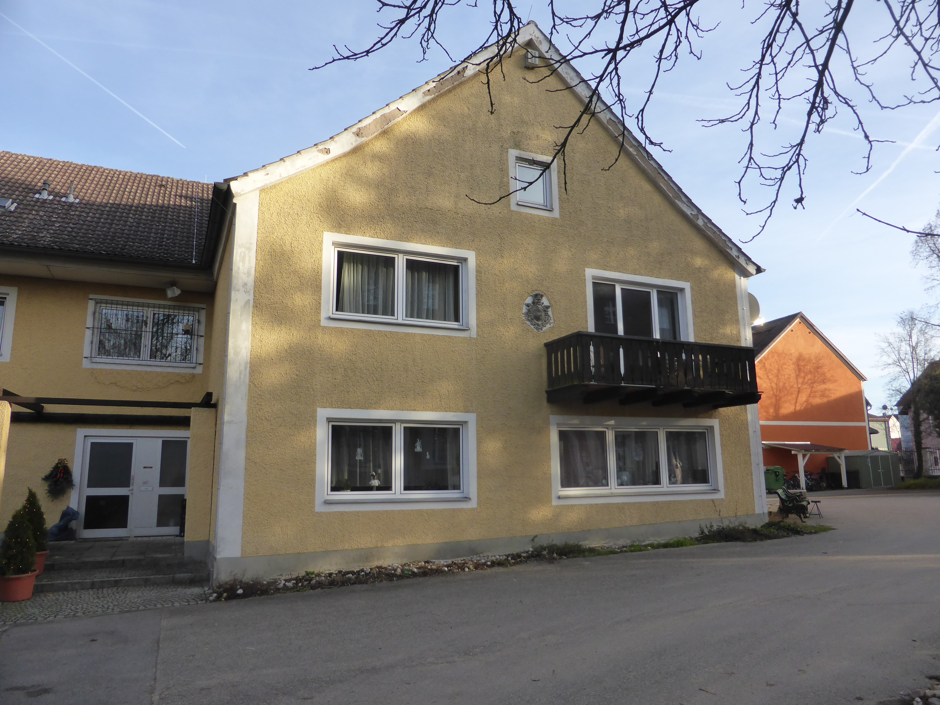 Neues Schloss Teublitz (Teublitz)